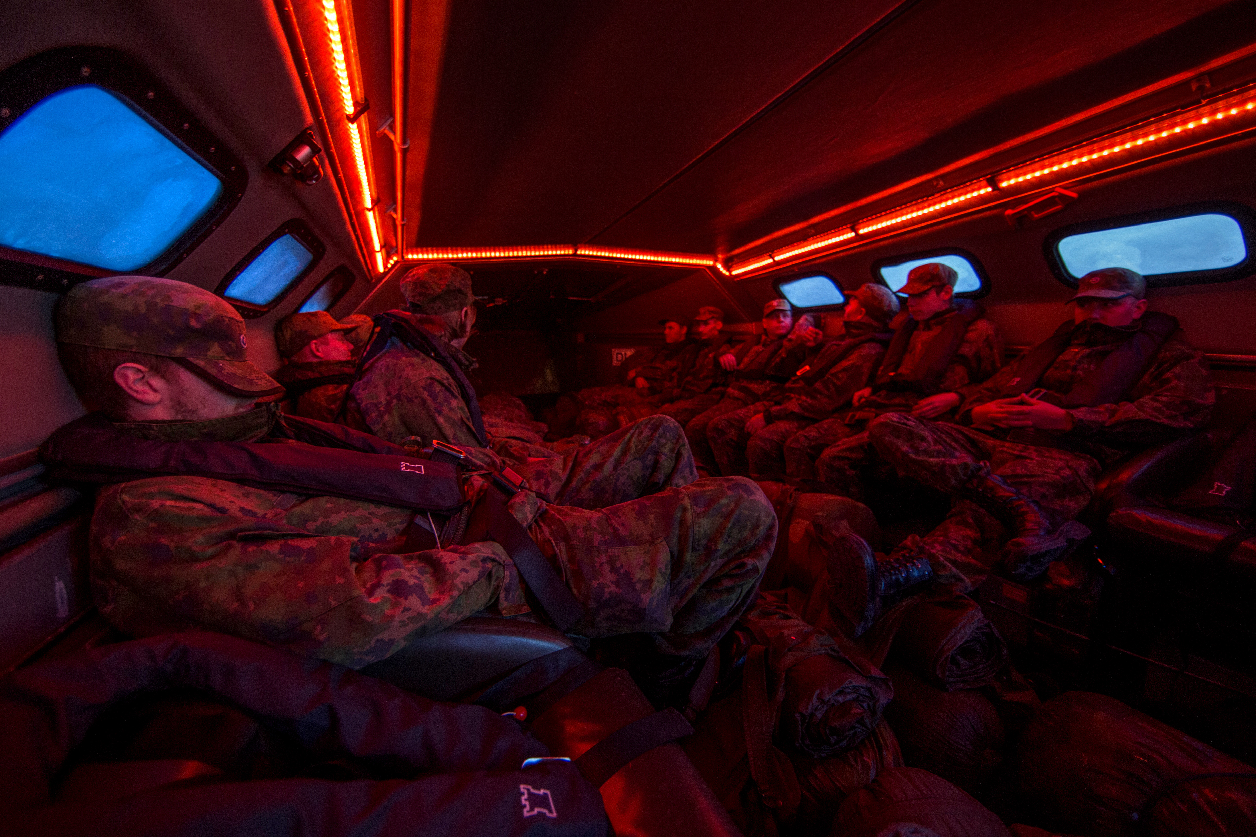 Sisäkuva Jurmo-luokan veneestä